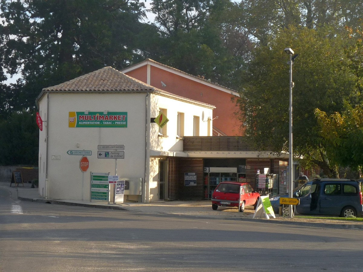 Multi-services, Clérac, Charente-Maritime, France